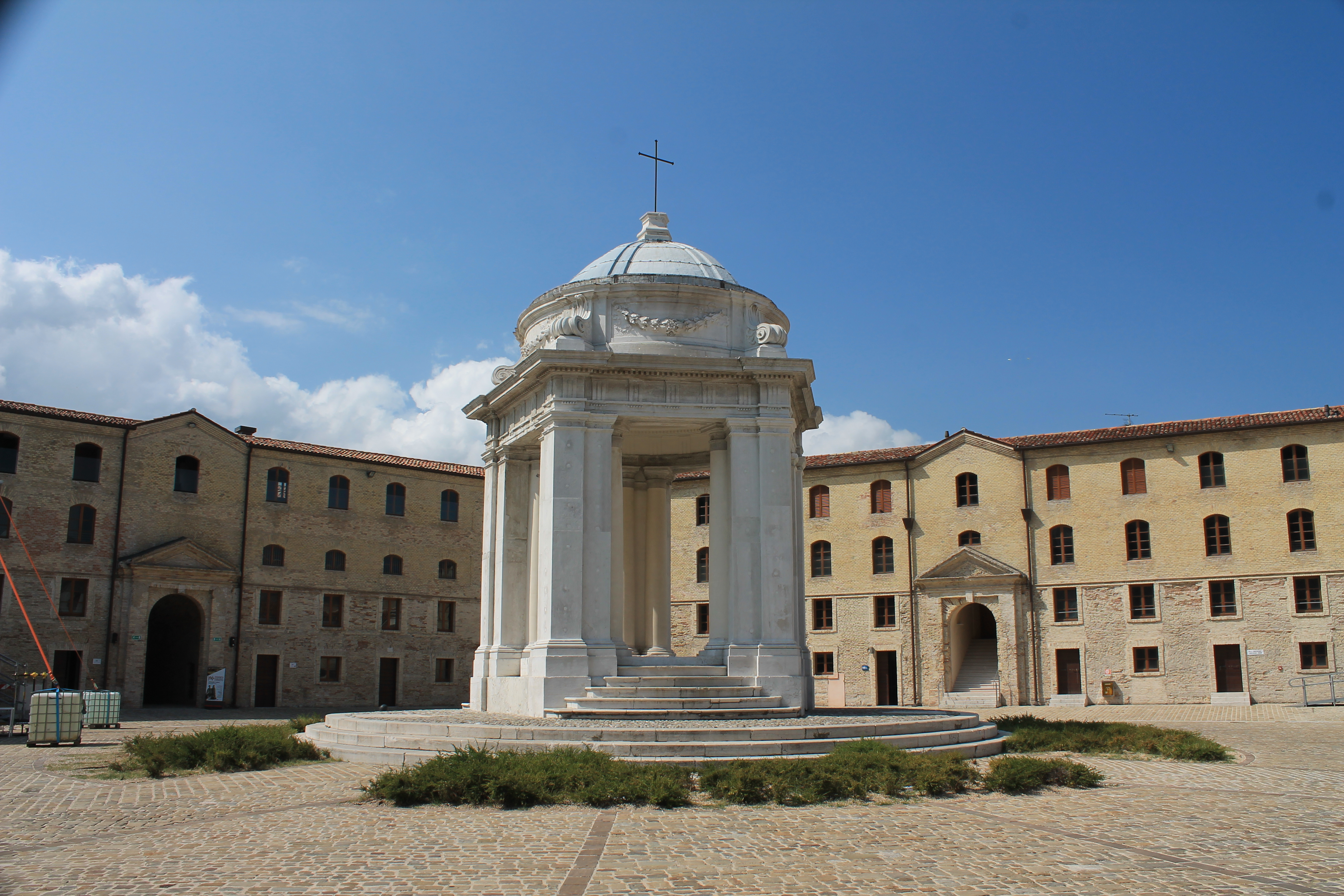 Mole Vanvitelliana This is a photo of a monument which is part of cultural heritage of Italy.